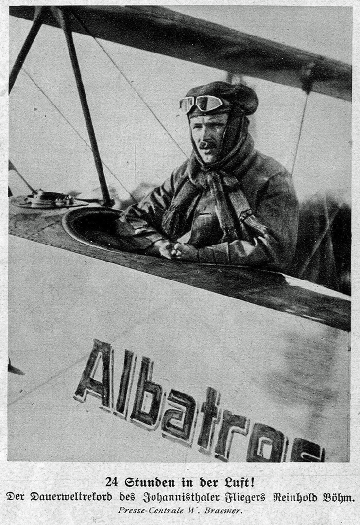 Reinhold Böhm im Albatros-Doppeldecker Juli 1914